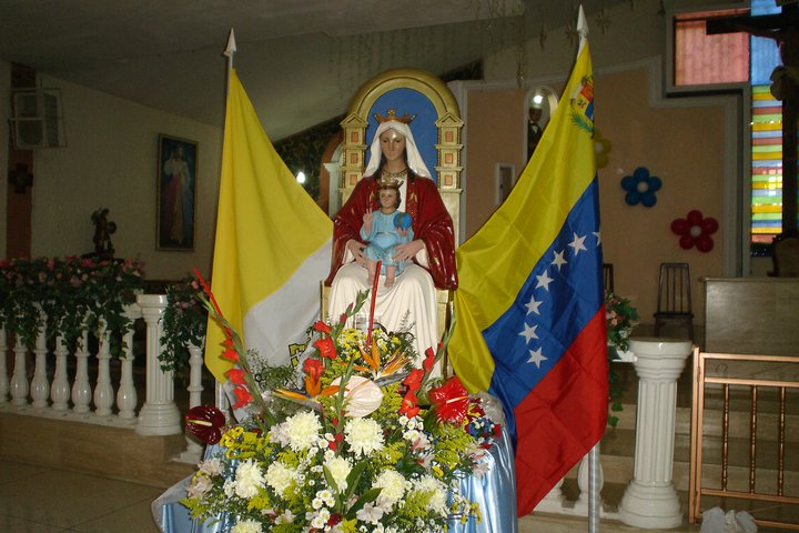 imagen de nuestra señora de Coromoto, patrona de Venezuela con las banderas de la vaticano y nacional en la Parroquia Santo Domingo Savio, Coche Caracas Venezuela